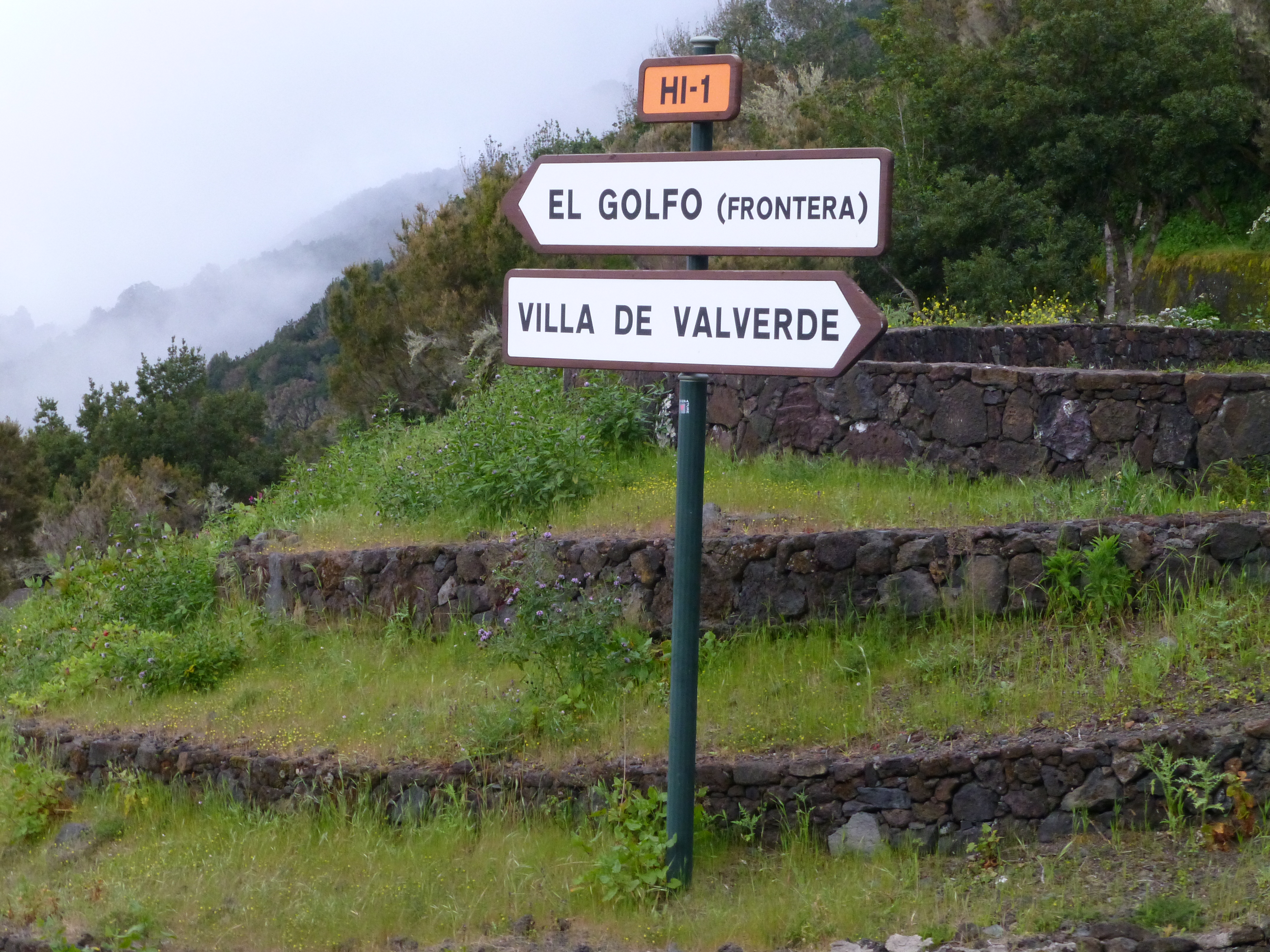 Señal identificando una carretera de la isla de El Hierro. Antiguamente, la carretera por la cumbre era el medio de comunicación entre la capital (La Villa, o Valverde) y el municipio de La Frontera (en El Golfo). Ahora hay una autovía que acorta las distancias, mediante un túnel.